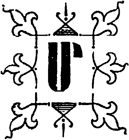 Նոր-Ջուղայի դպրոցները գրքից պատկեր, էջ 40, «Մ» տառ